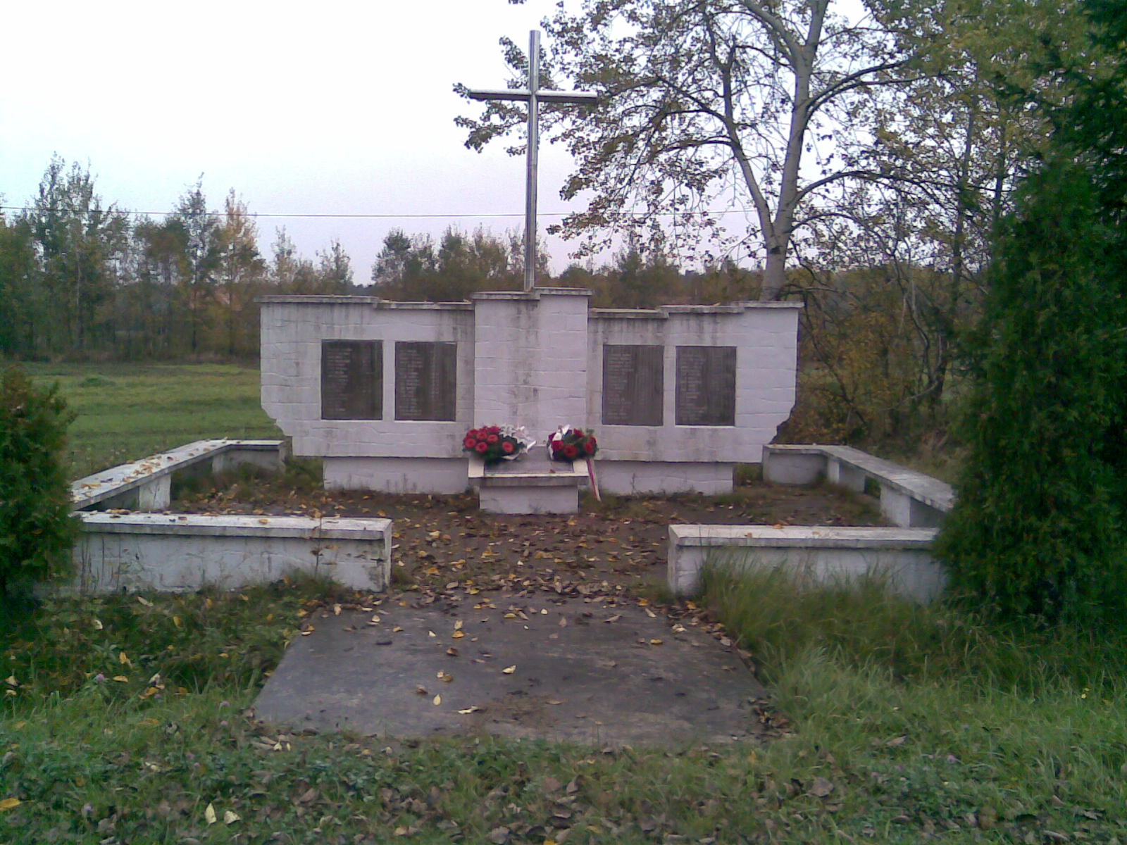 Pomnik ku czci pomordowanych poczas pacyfikacji Strużek w 1943